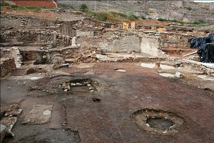 Vista de las termas romanas de Cartagena (España) en proceso de excavación en octubre de 2008. Zona de la palestra